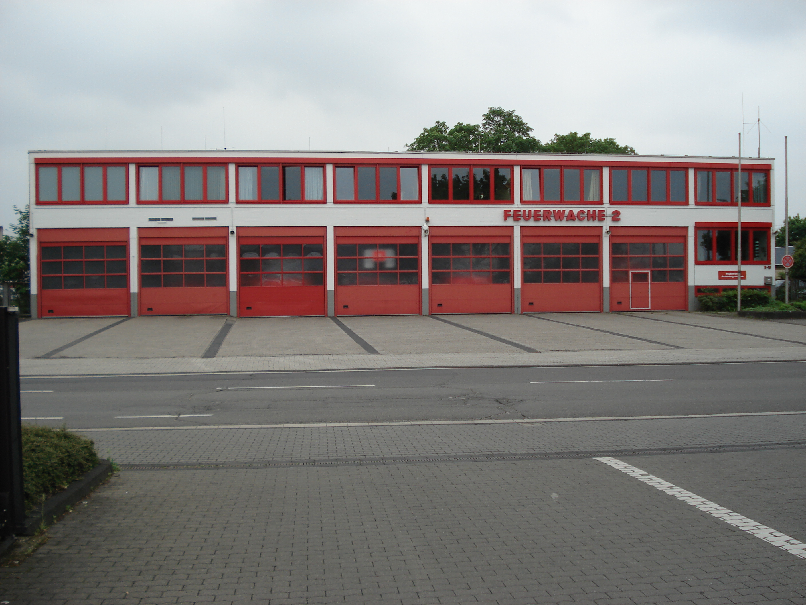 Feuerwache 2, Maarstraße 8–10, Bonn-Beuel (Ortsteil Beuel-Ost)